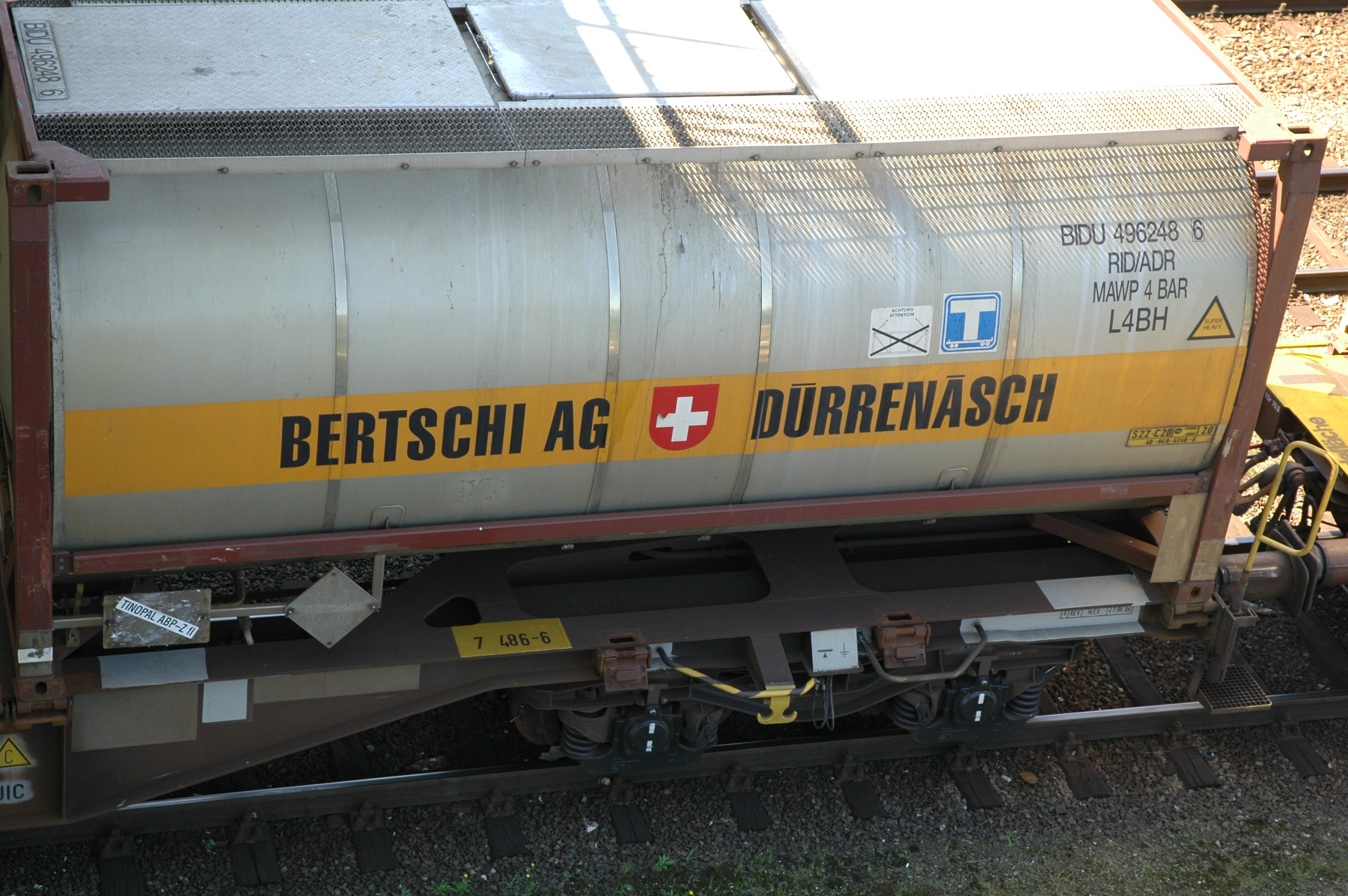 Tankcontainer der Schweizer Transportgesellschaft Bertschi AG, Dürrenäsch. Fotografiert im Linzer (Österreich) Industriegebiet